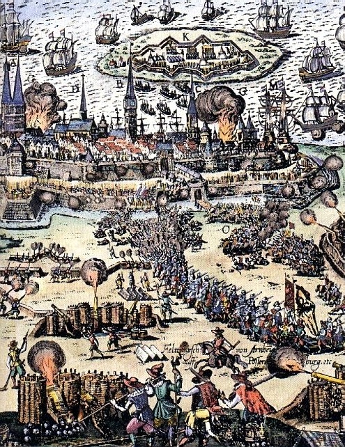 Assedio di Stralsund